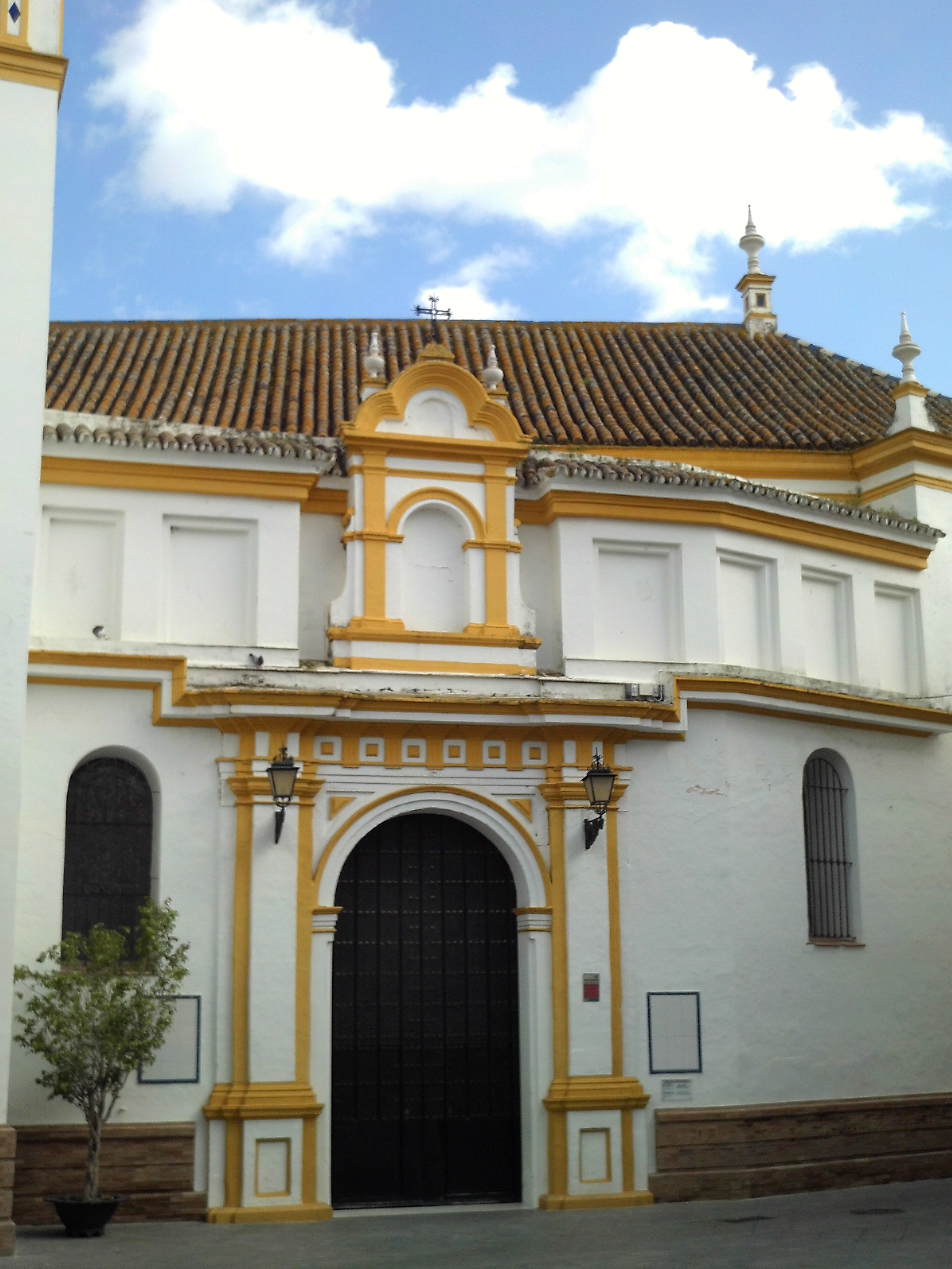 Iglesia de Nuestra Señora de la Estrella. Coria del Río, provincia de Sevilla, Andalucía, España.